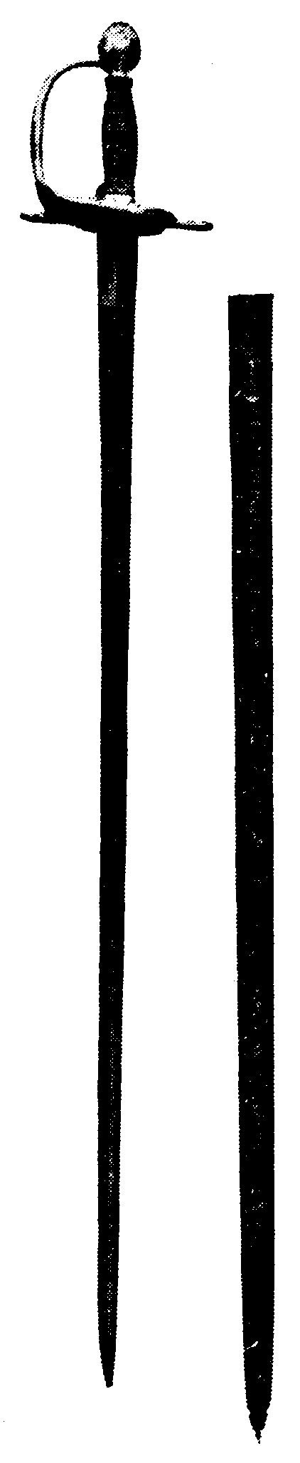 Svensk värja med balja, av 1685 års modell.